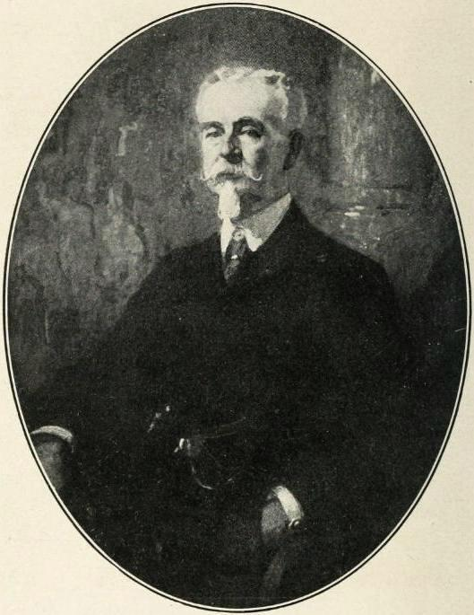 "Portrait du Marquis de Massa".